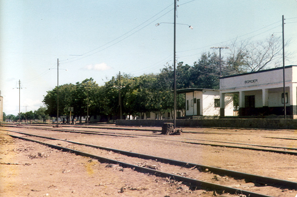 Grenzstation der Malawi Rail im Süden zu Mosambik